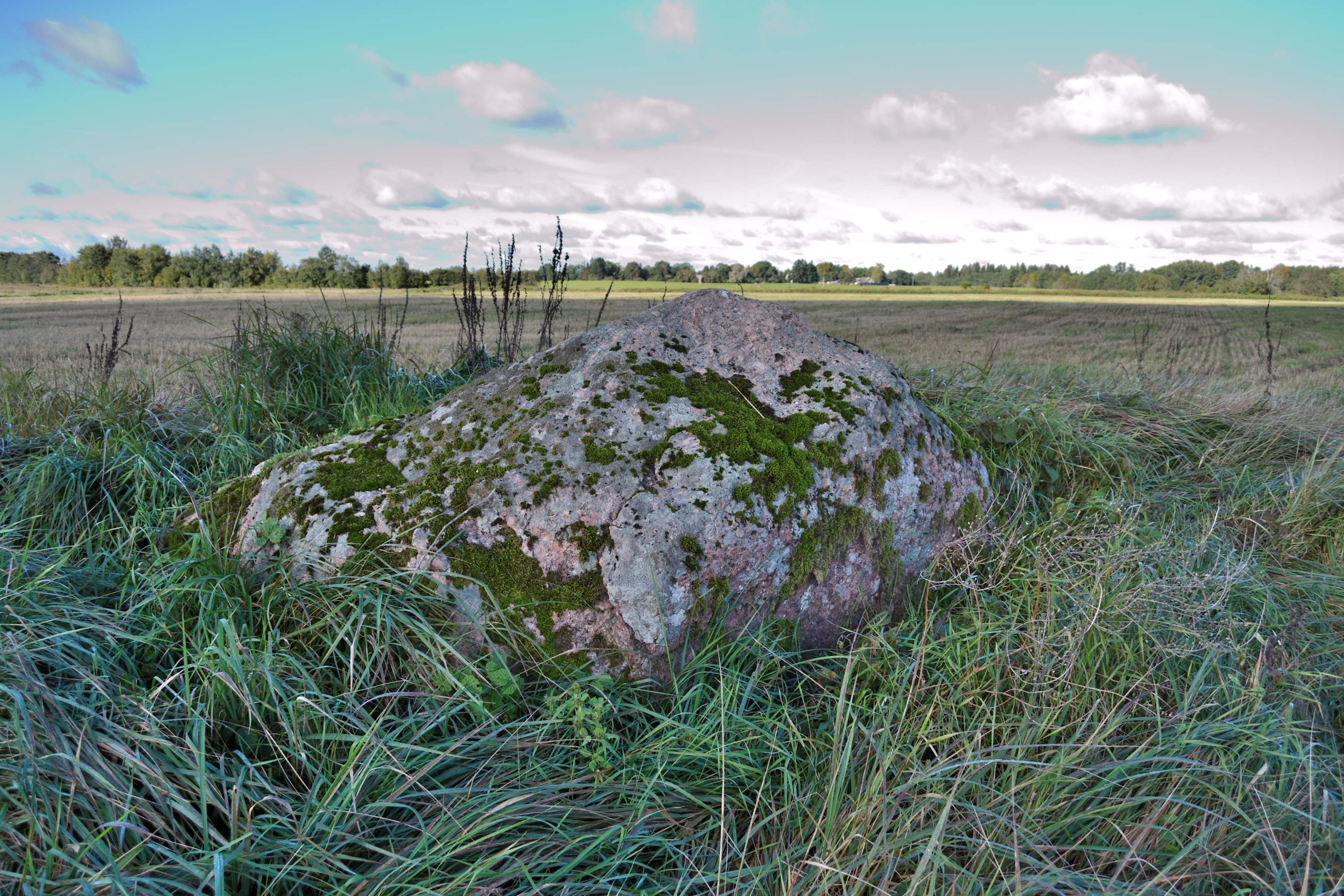 Kultusekivi, Saue vald, Jõgisoo küla Uuetoa